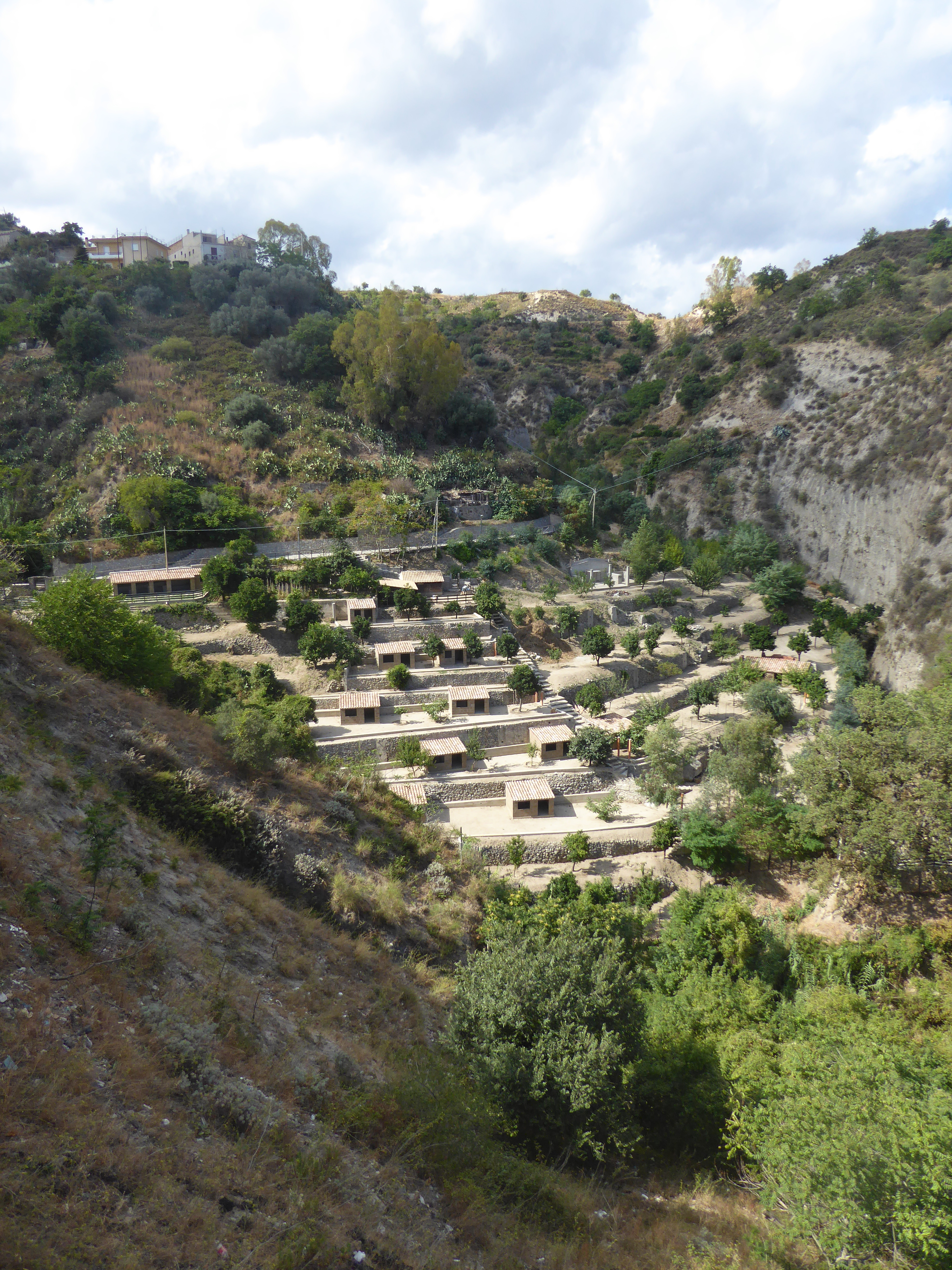 Panorama a Riace